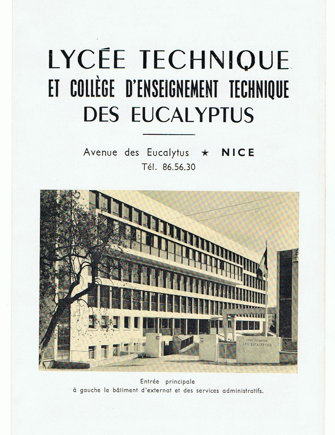 Recto de la plaquette du lycée et du CET des «Eucalyptus» ayant succédé en 1964 au Centre d'apprentissage Georges Lamarque de 1946 à Nice (Alpes Maritimes) France